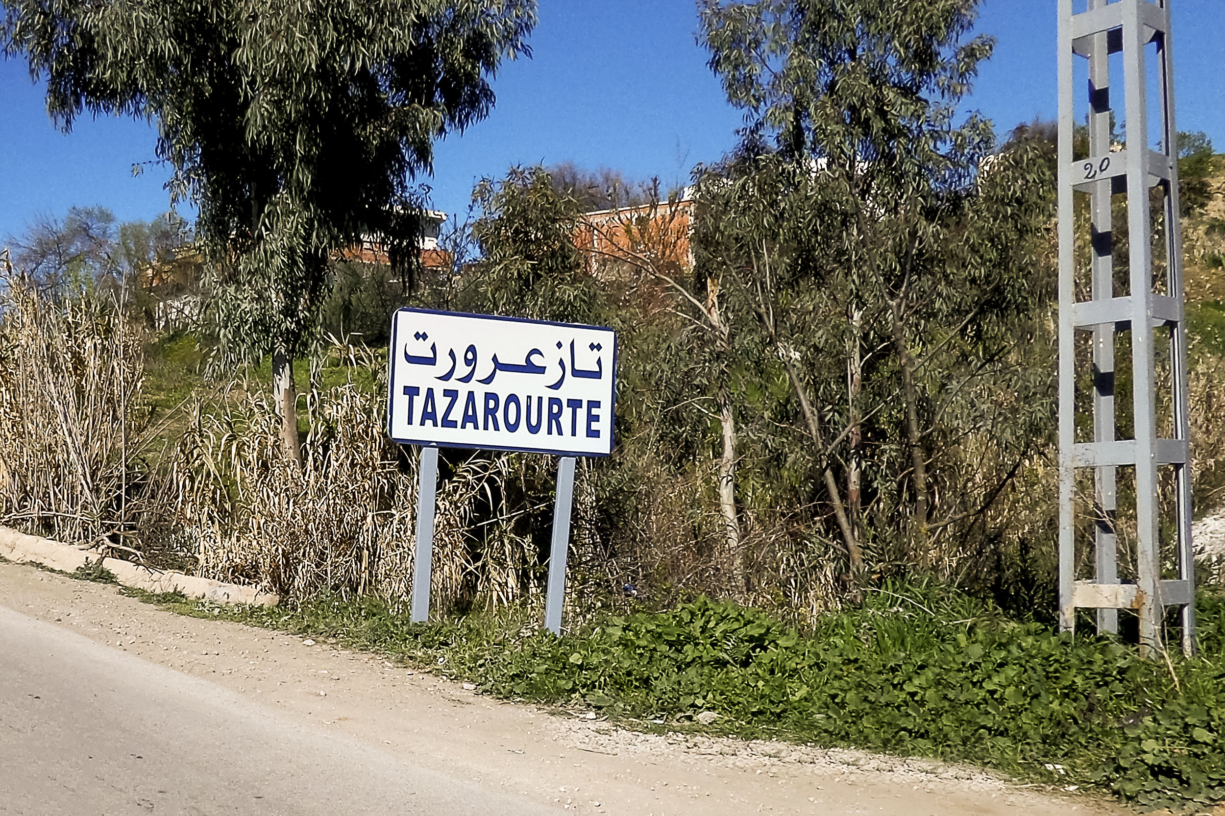 Tazarourte - Kherrata تازعرورت - خراطة Tazarourte - Kherrata تازعرورت - خراطة Wilaya de Bejaia ولاية بجاية